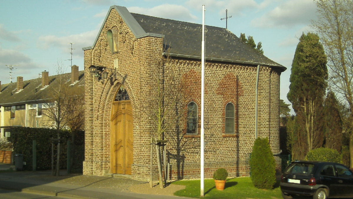 Die Kapelle an der Viersener Straße in Willich-Vennheide im nordrhein-westfälischen Kreis Viersen.